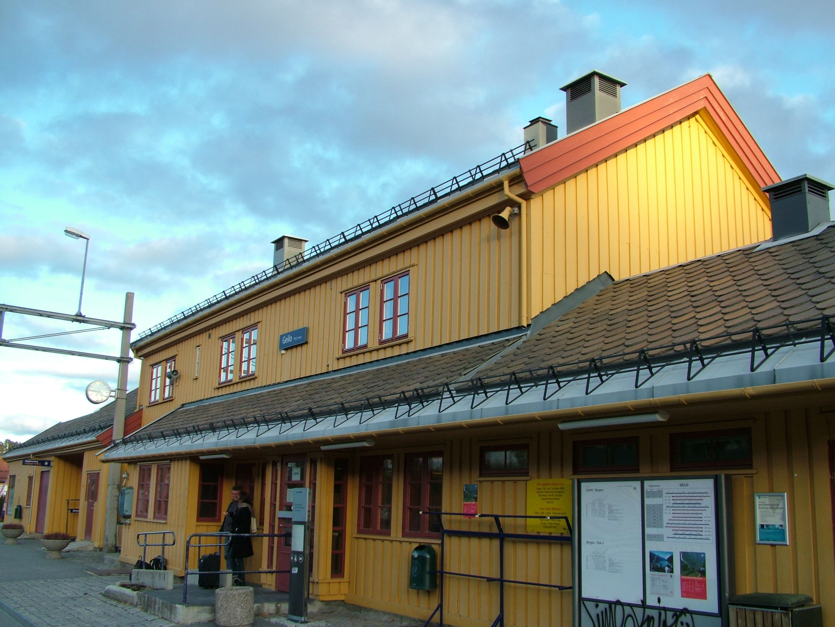 Norwegen, Kommune Hol, Geilo, der Bahnhof